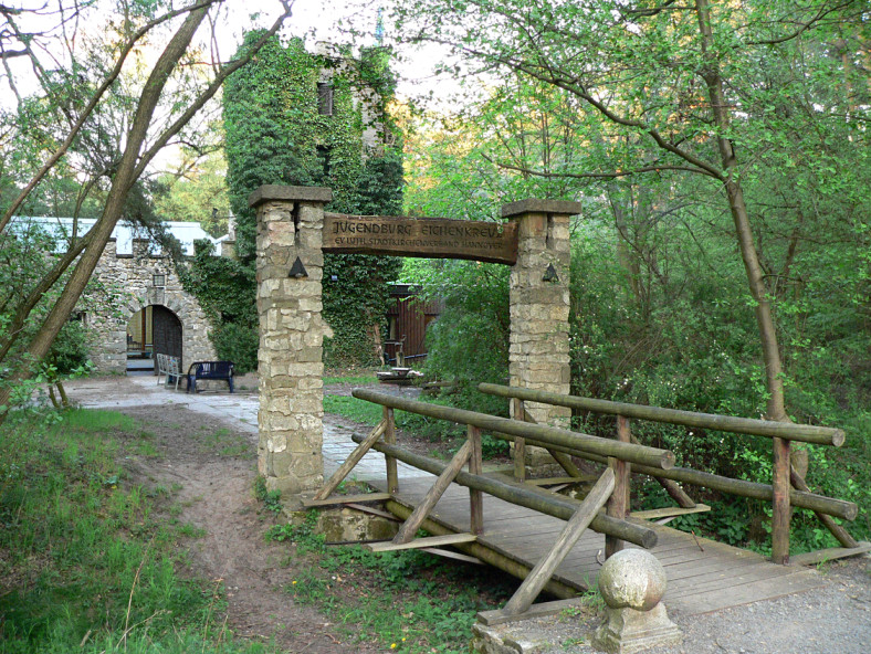 Eichenkreuzburg Vorderseite mit Brücke